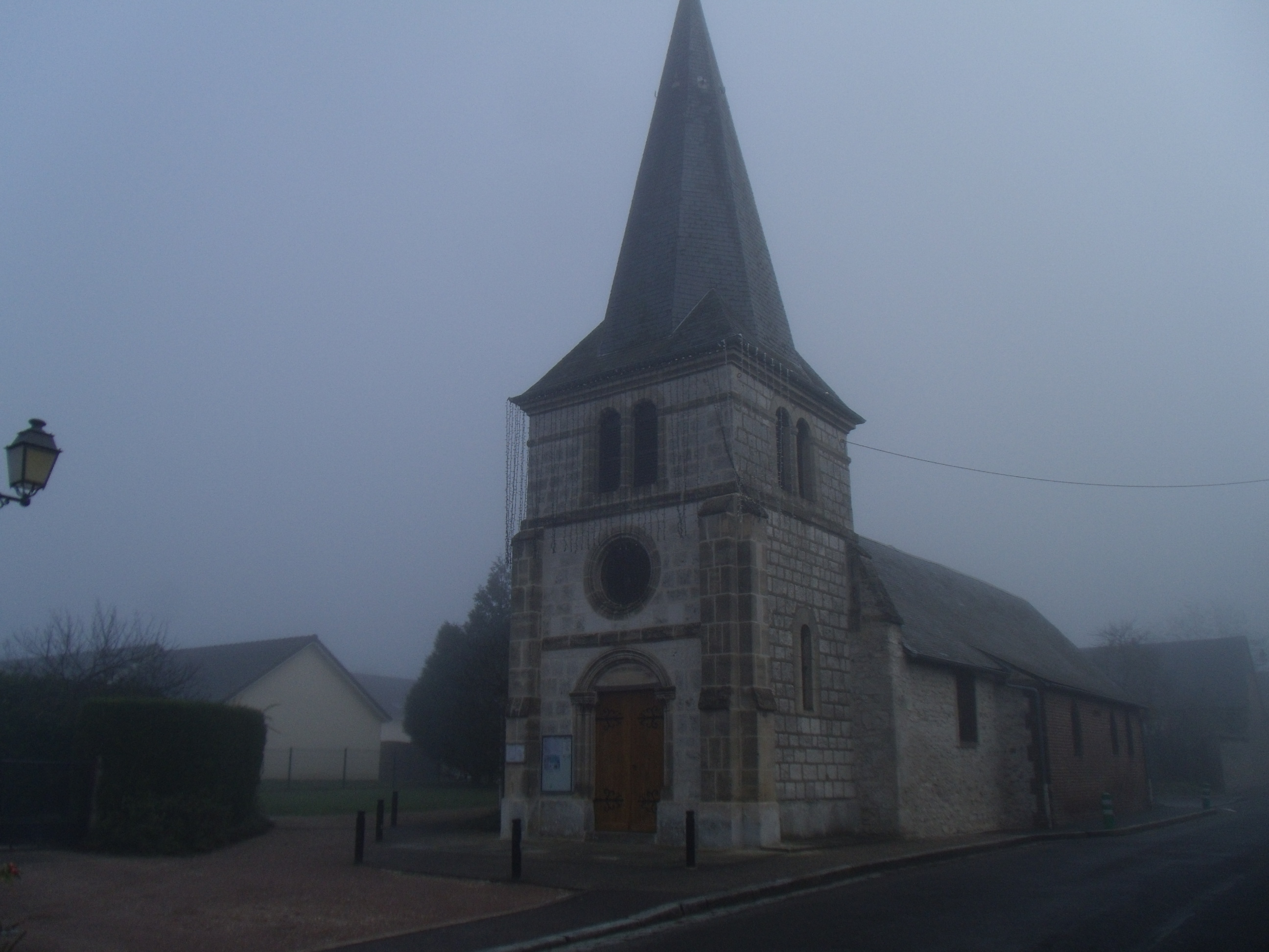 L'église de Courcelles-sur-Seine